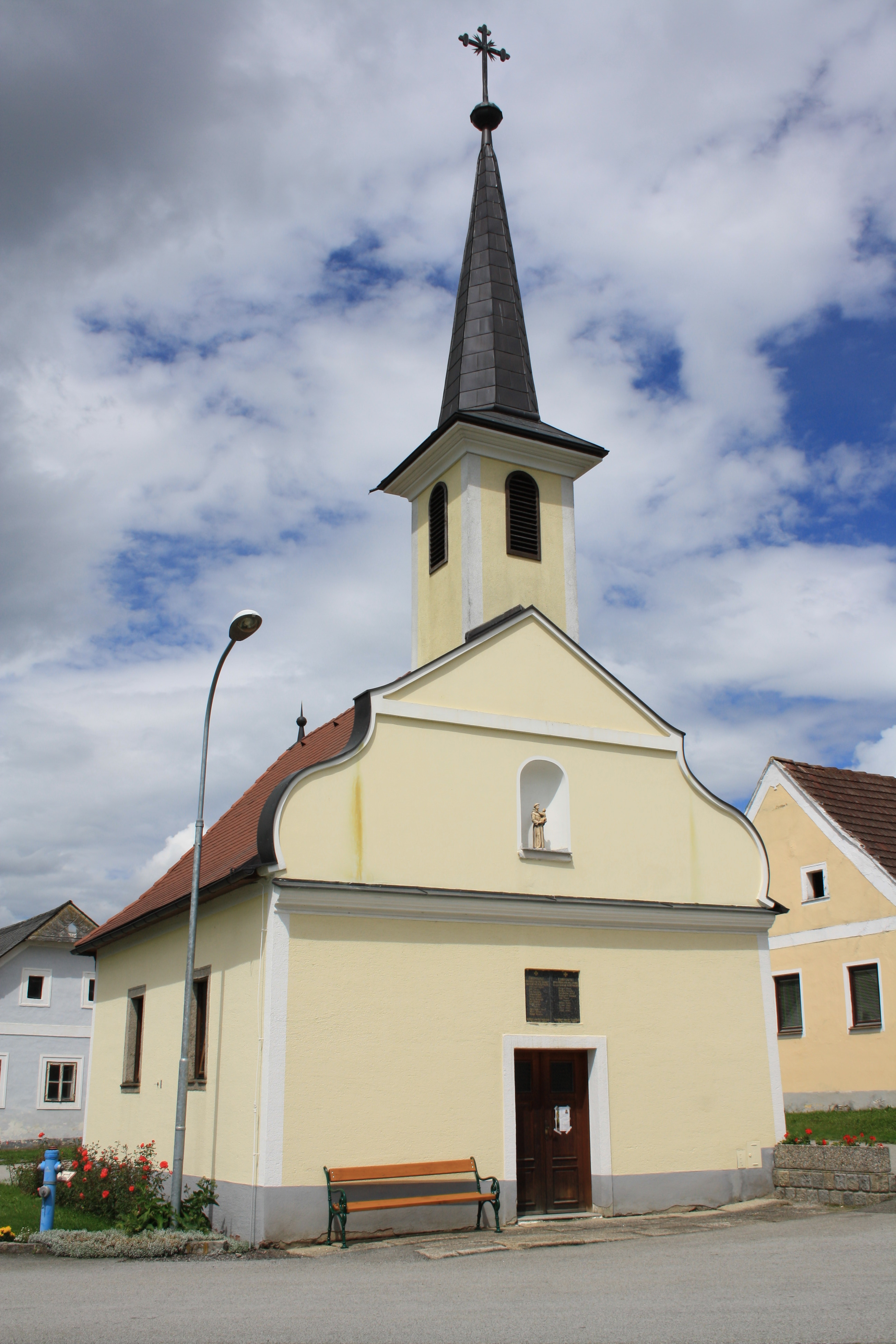 Ortskapelle in Großrupprechts, Gemeinde Vitis, Bezirk Waidhofen/Thaya, Austria